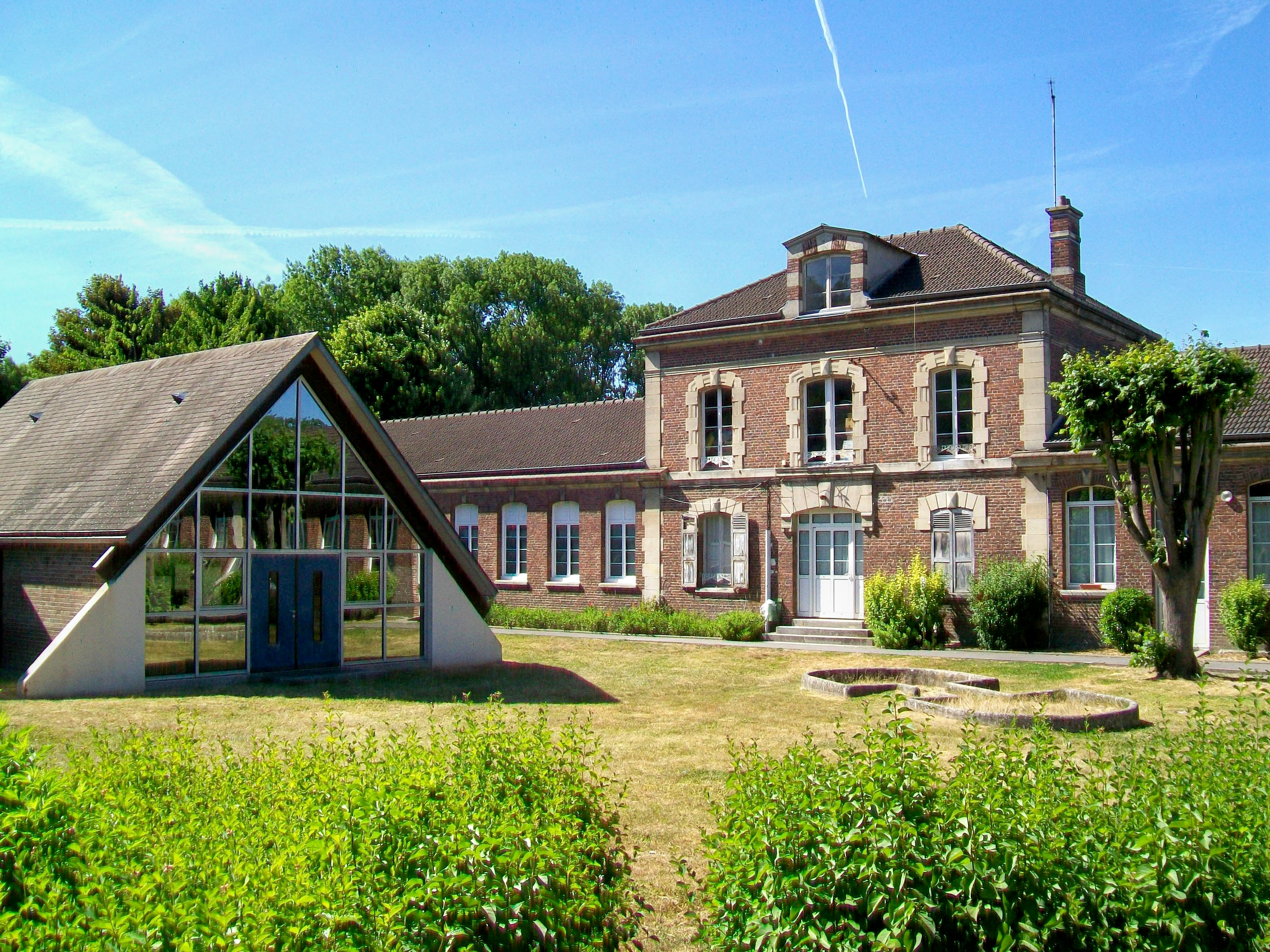 L'école élémentaire Ferdinand-Buisson, rue Louis-Boilet, à l'ouest de la ville.